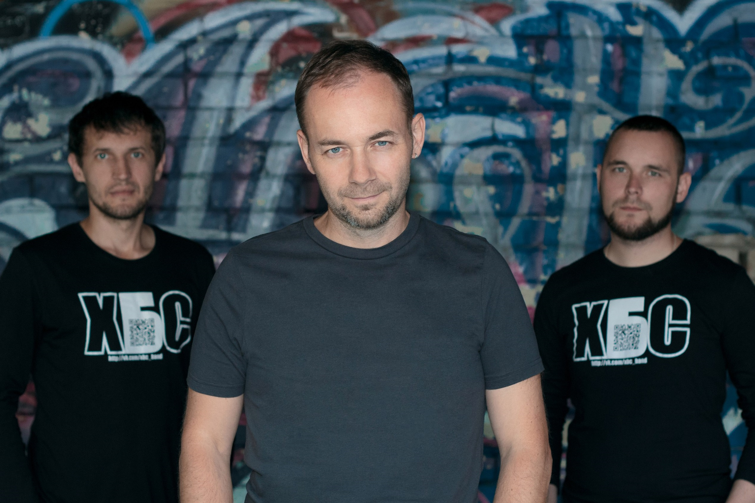 ХБС фото